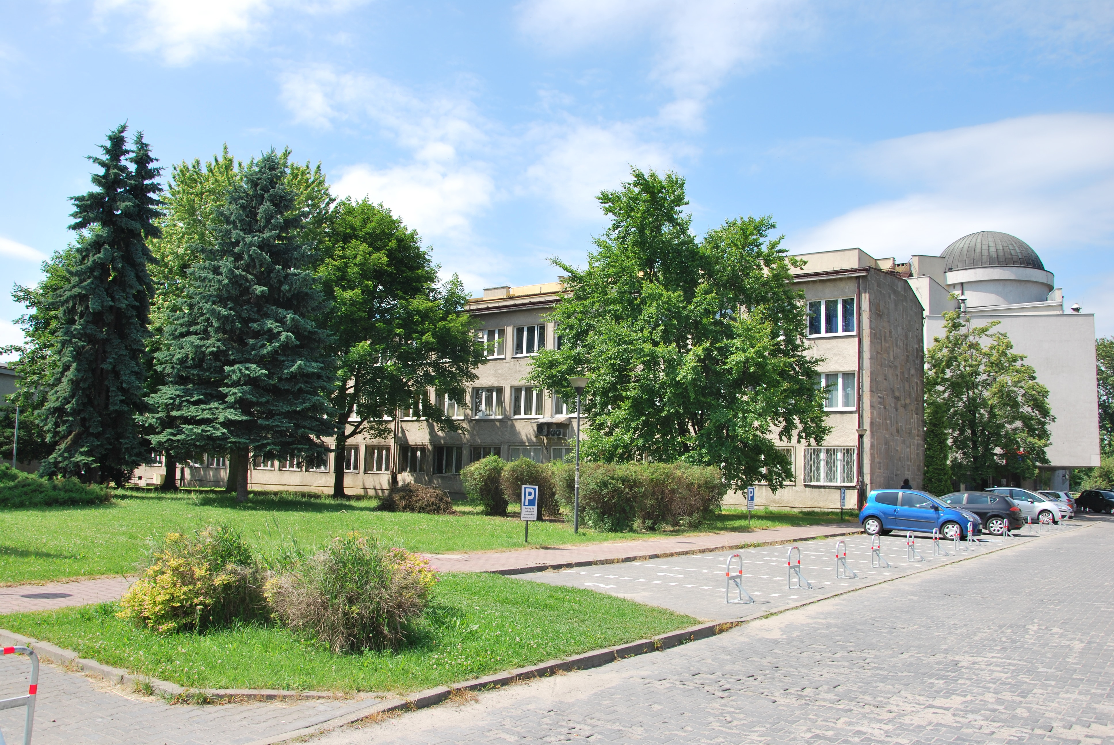 Planetarium Instytutu Fizyki (al. Armii Krajowej 13/15)